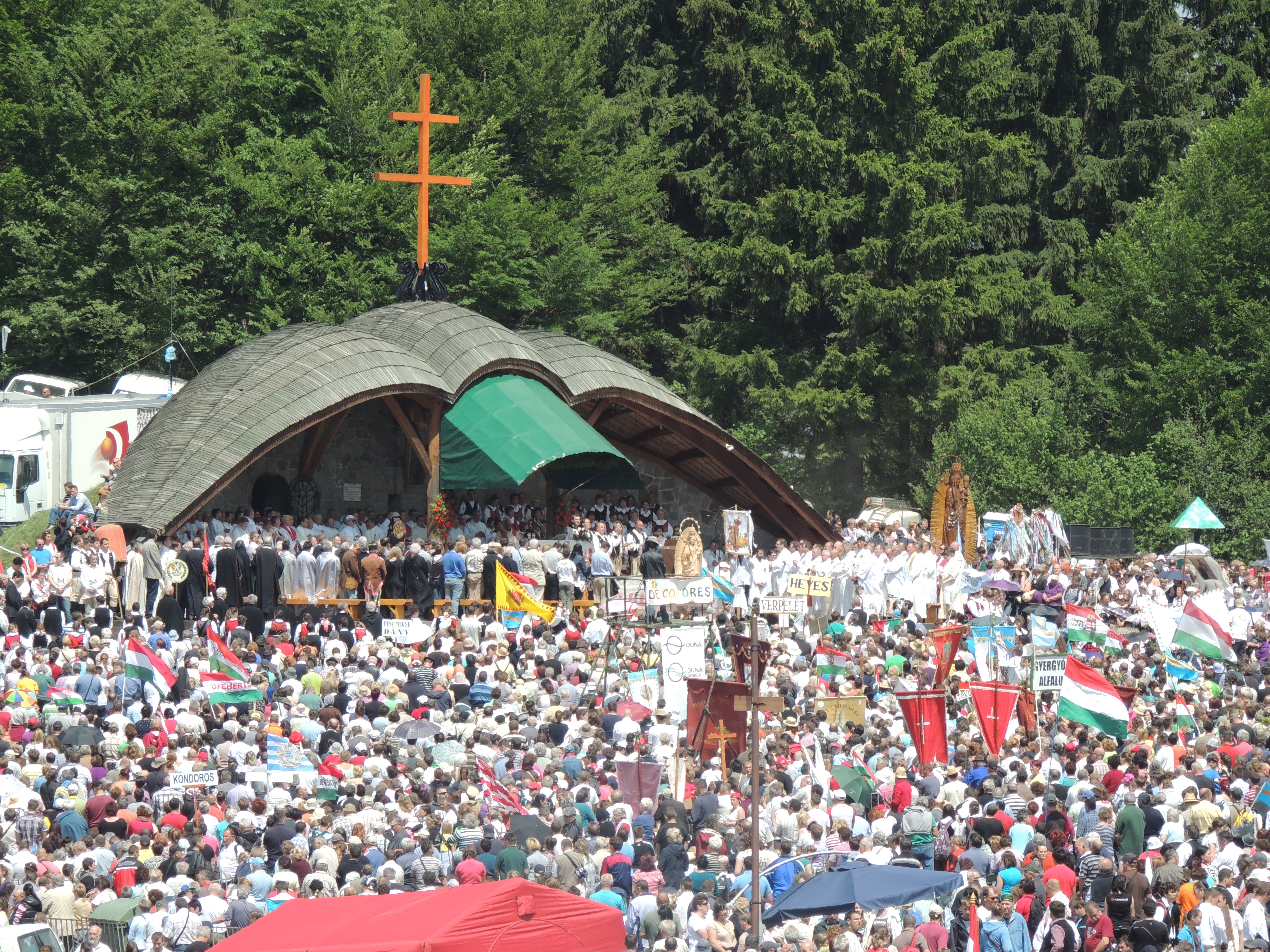 A 2013-as csíksomlyói búcsú.